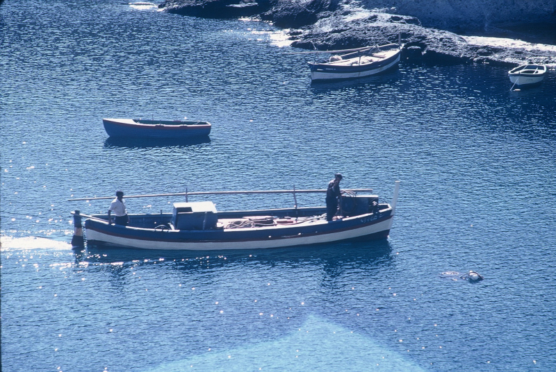 ritorno dalla pesca